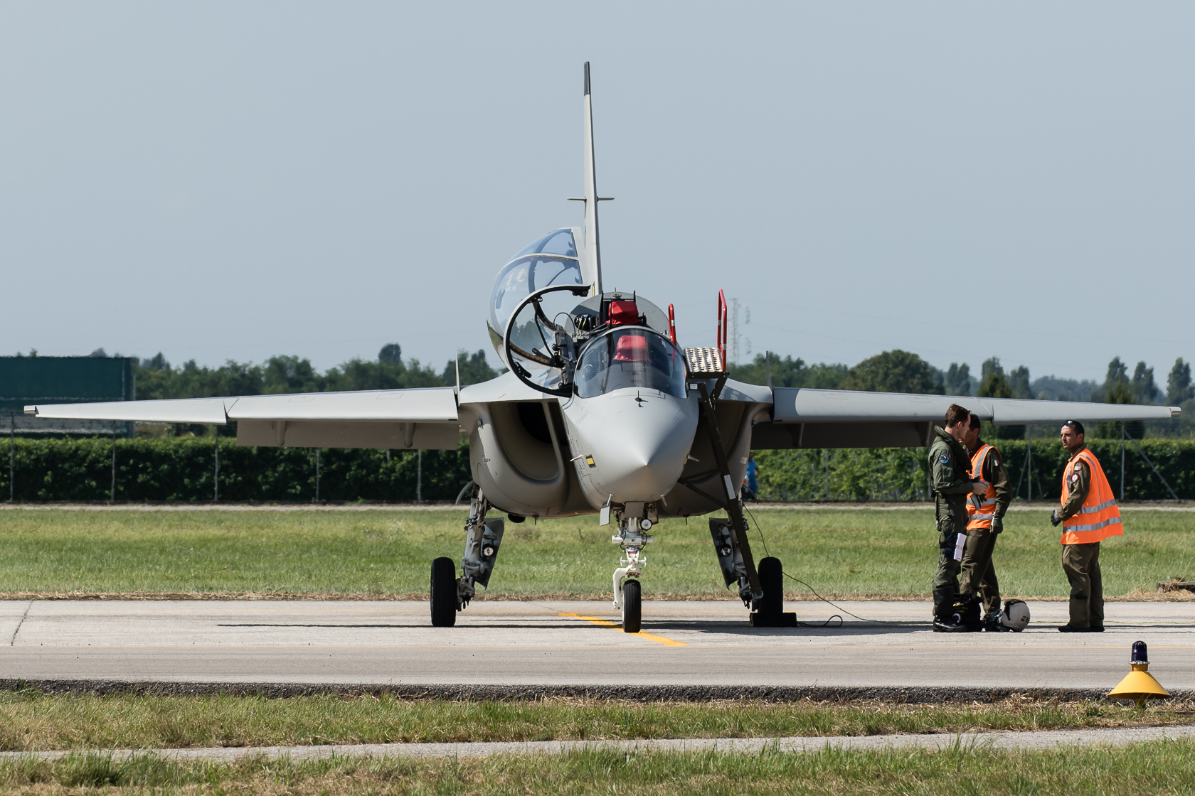 Alenia Aermacchi T-346A Master MM55155 61-04